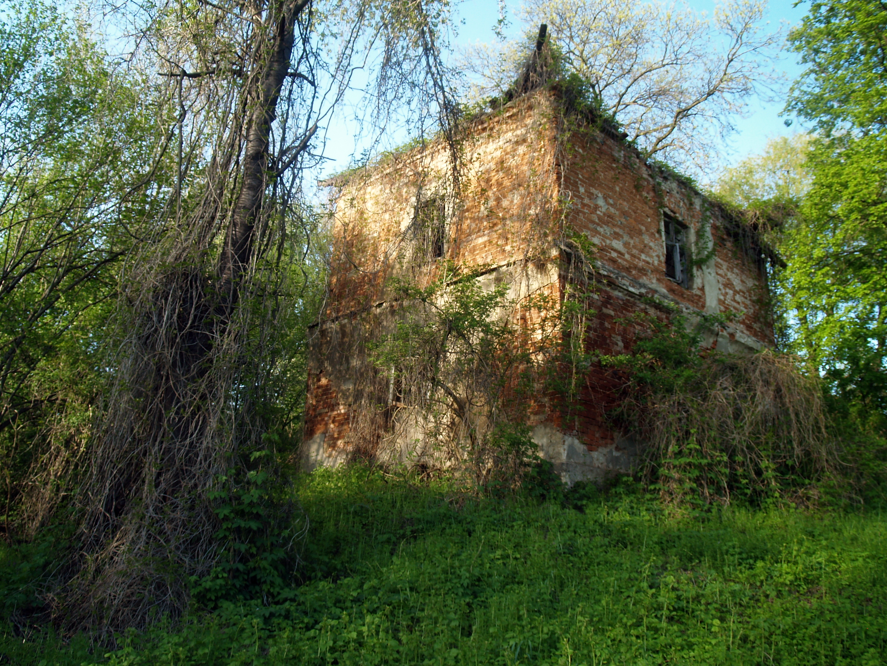 Ruiny lamusa (XVI w.) w zespole dworskim w Dębicy-Latoszynie 10.1973.